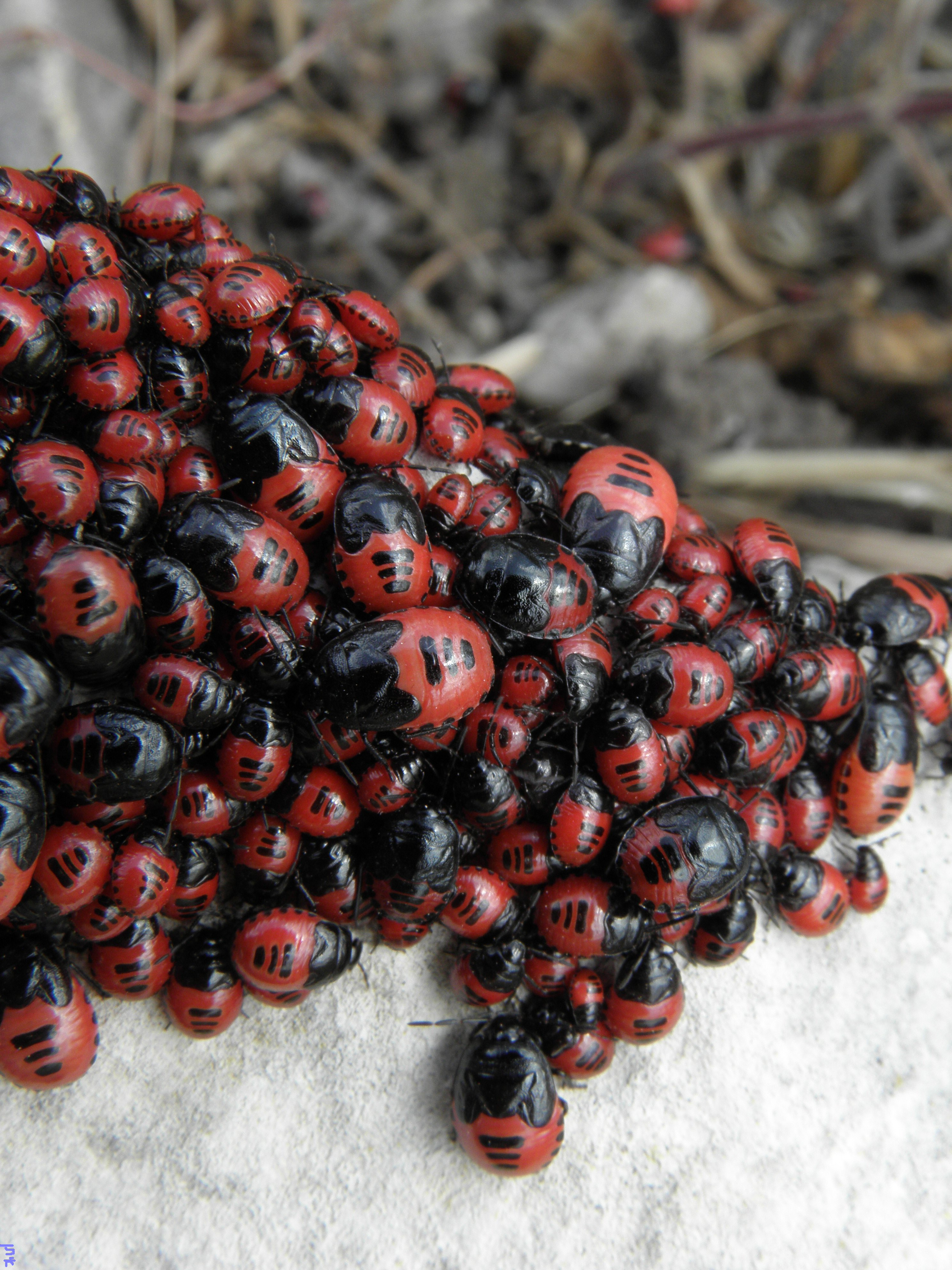 Canthophorus melanopterus nymphs נימפות של סרחן שחור-כנף